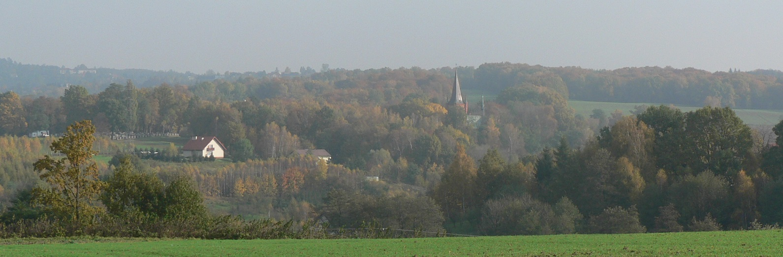 Poręba Radlna k.Tarnowa. Po lewej cmentarz z kaplicą cmentarną, po prawej kościół. Panorama przysiółka Sutkówka. 2009